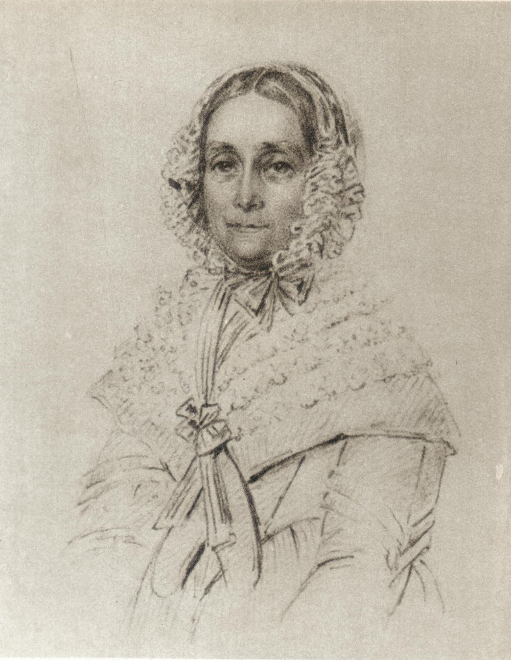 Malla Silfverstolpe (1782-1861), författare